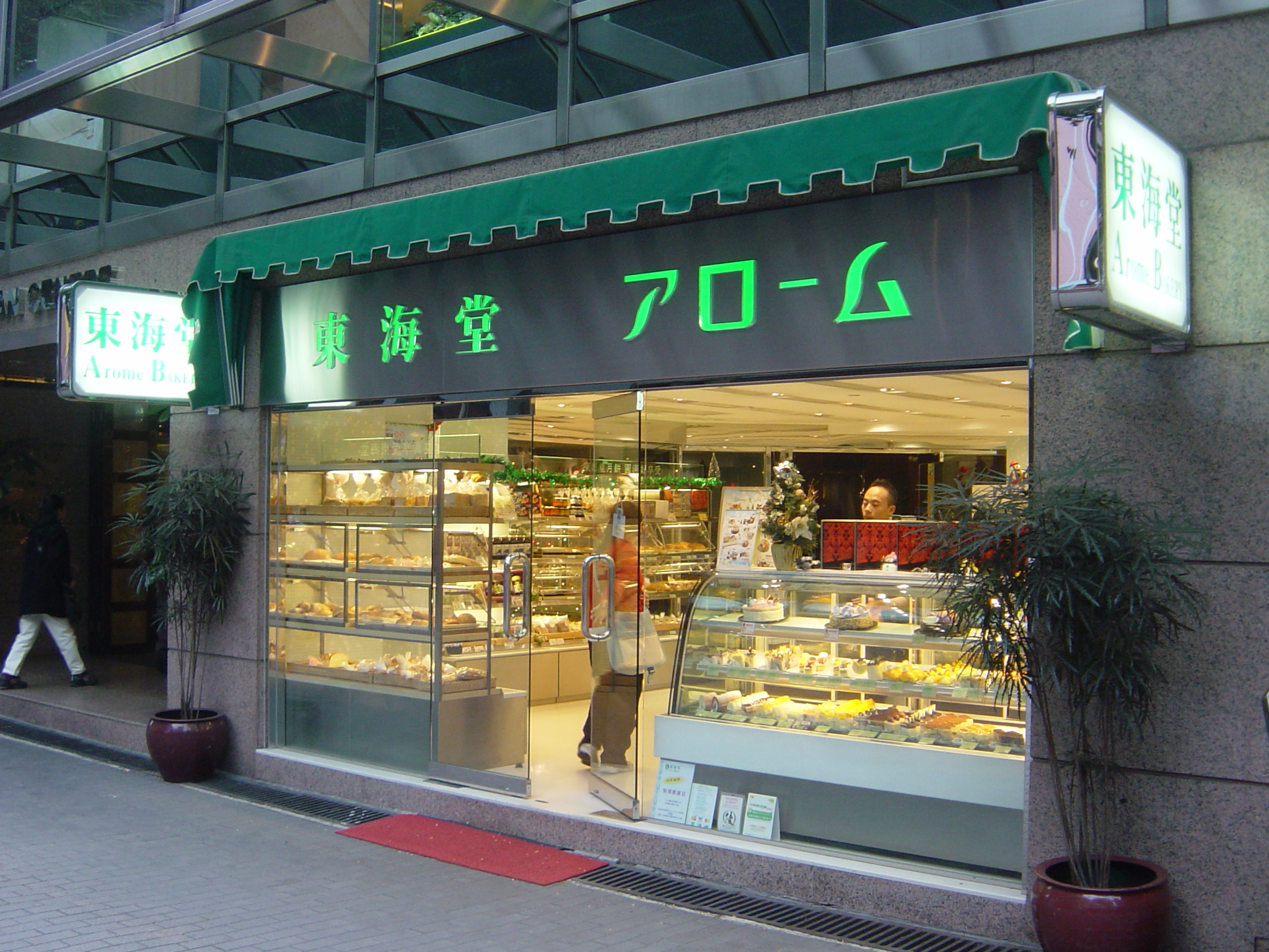 香港東海堂高級麵包西餅專門店，簡稱東海堂，是香港一家售賣麵包及西餅的連鎖店。